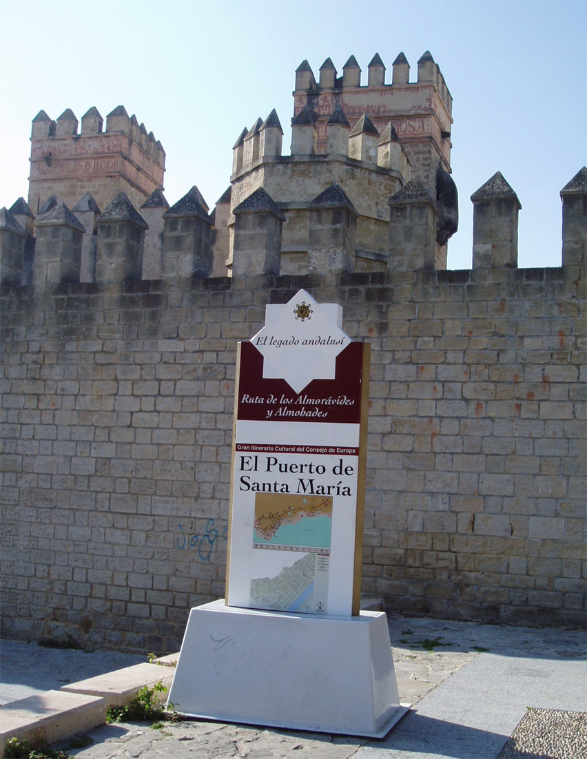 Panel turístico de la Ruta de los Almorávides y los Almohades en El Puerto de Santa María, España.